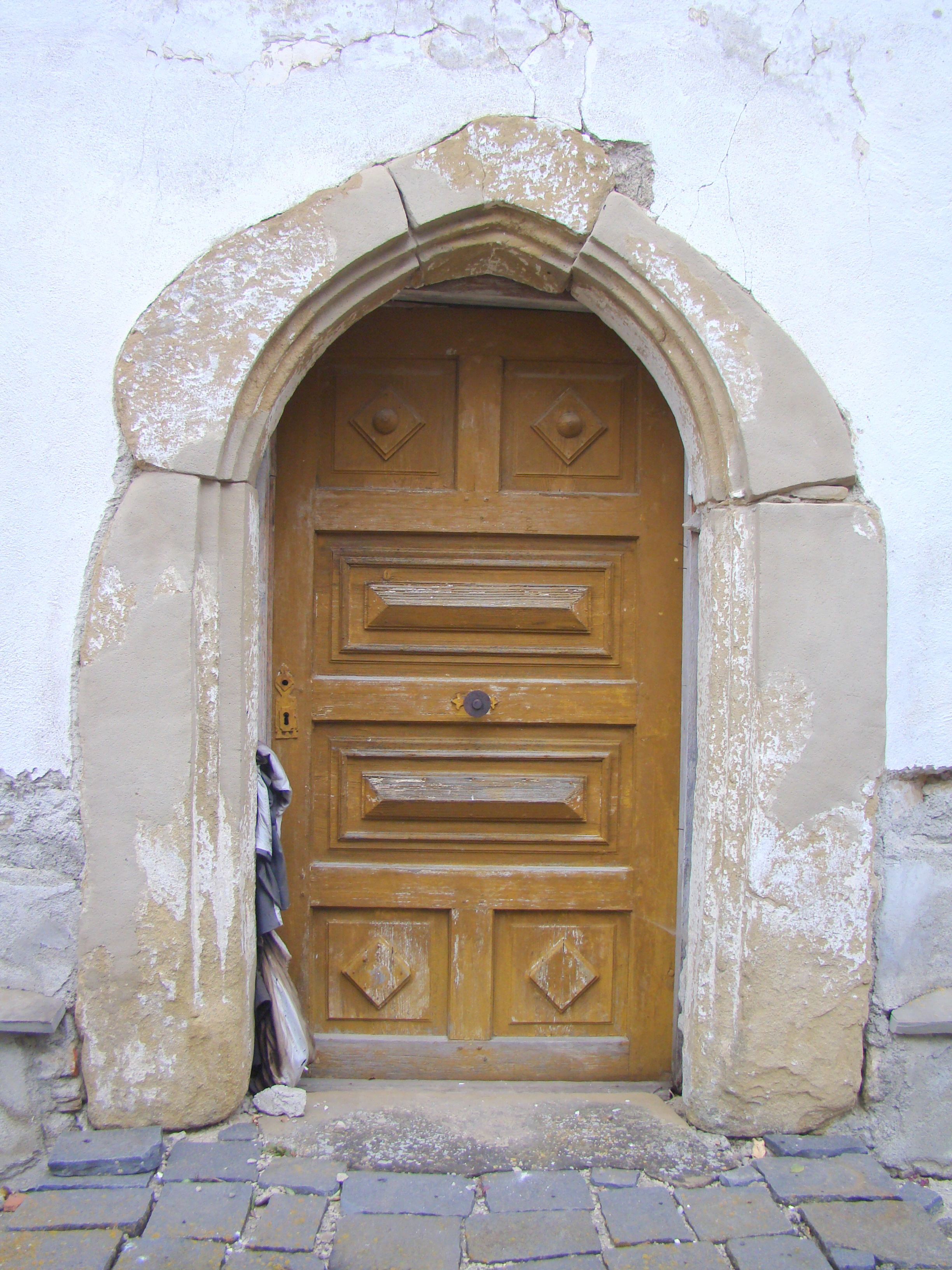 Biserica reformată sat Albiș; comuna Cernat 158 sec. XIII - XV, transf. sec. XVI - XIX 01